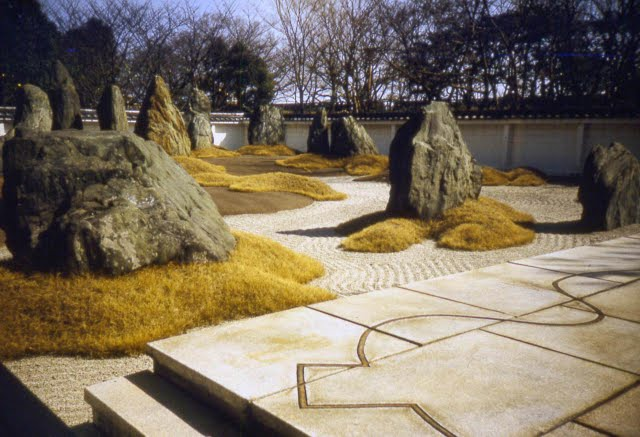 Сад камней в Киото